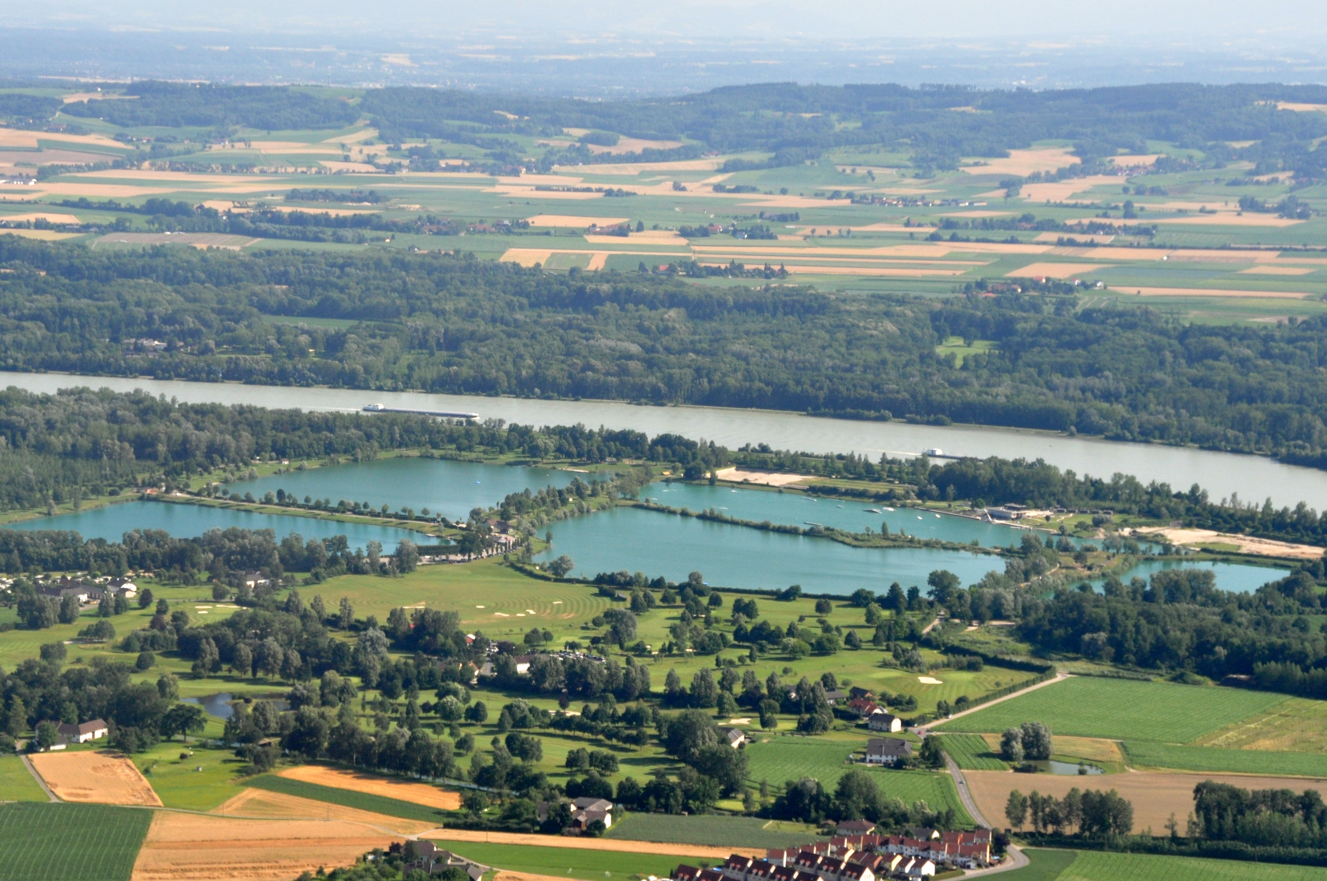 Fünf Baggerseen im Gemeindegebiet von Feldkirchen an der Donau, Österreich.